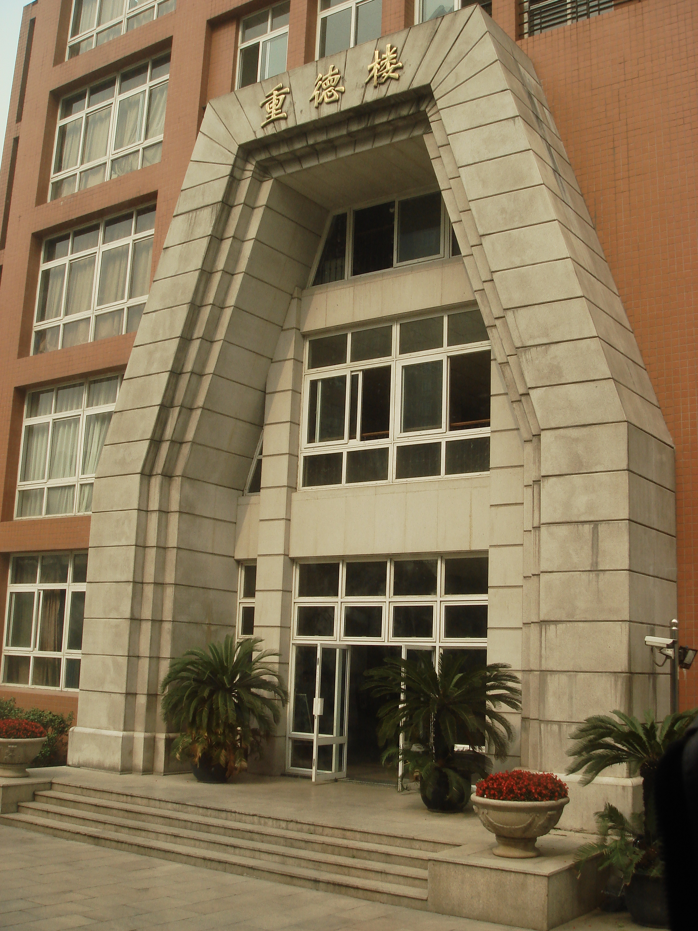 徐汇中学重德楼的入口